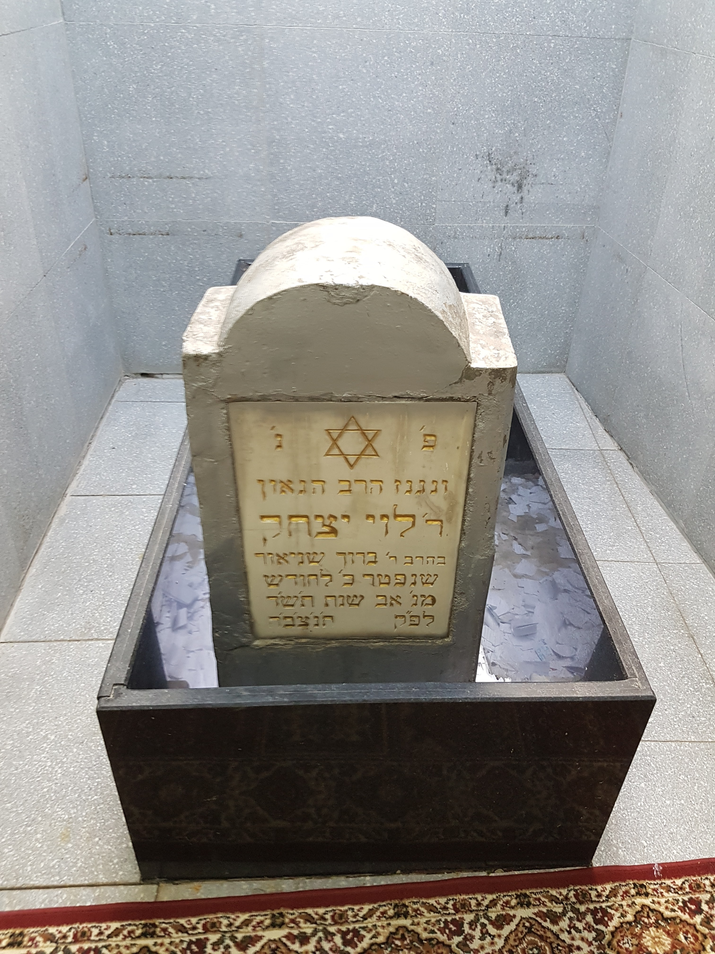 קברו של הרב לוי יצחק שניאורסאהן